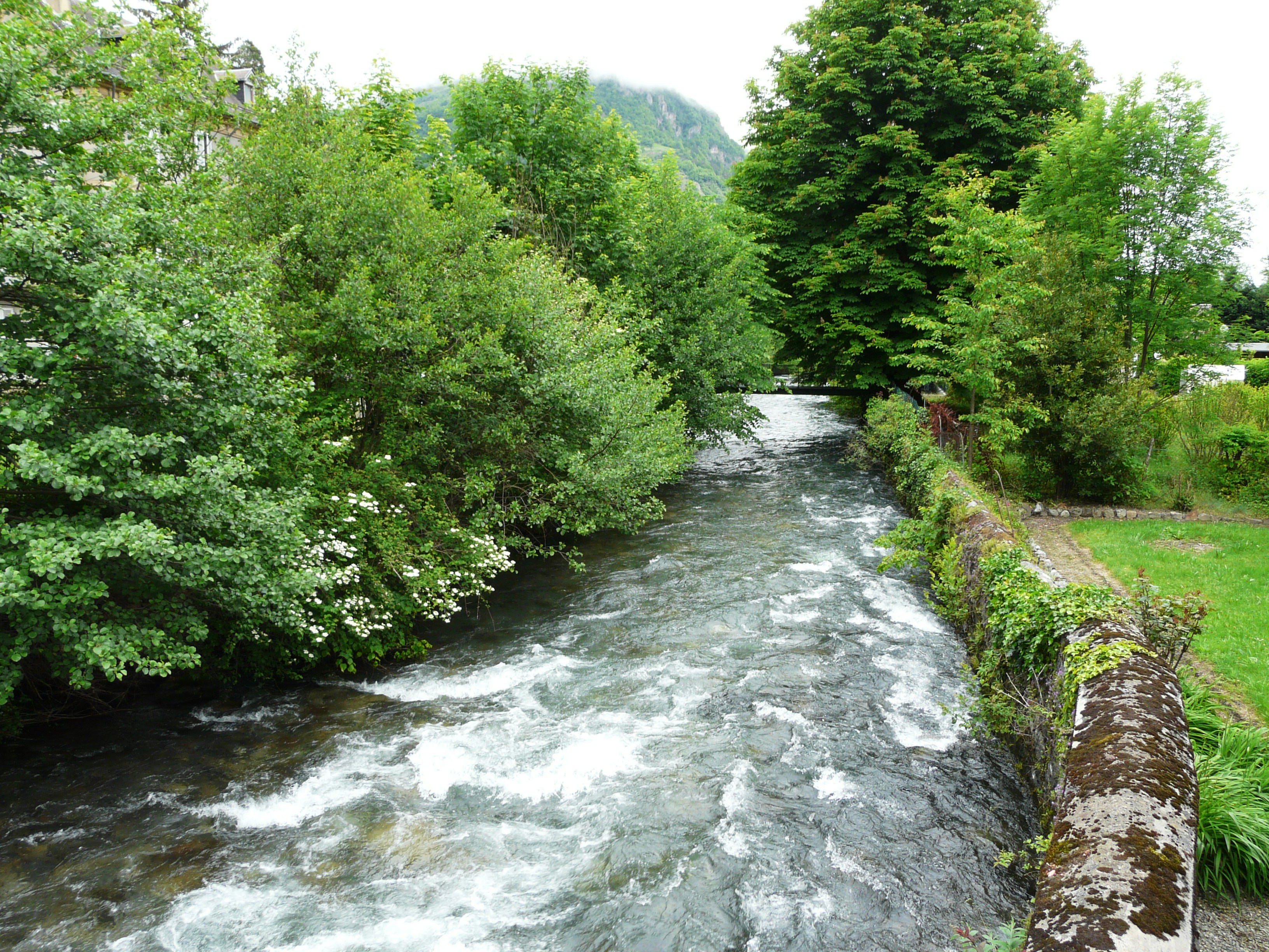 La Pique en amont du pont de la route départementale 618a en limites de Saint-Mamet (à gauche) et Bagnères-de-Luchon (à droite), Haute-Garonne, France.